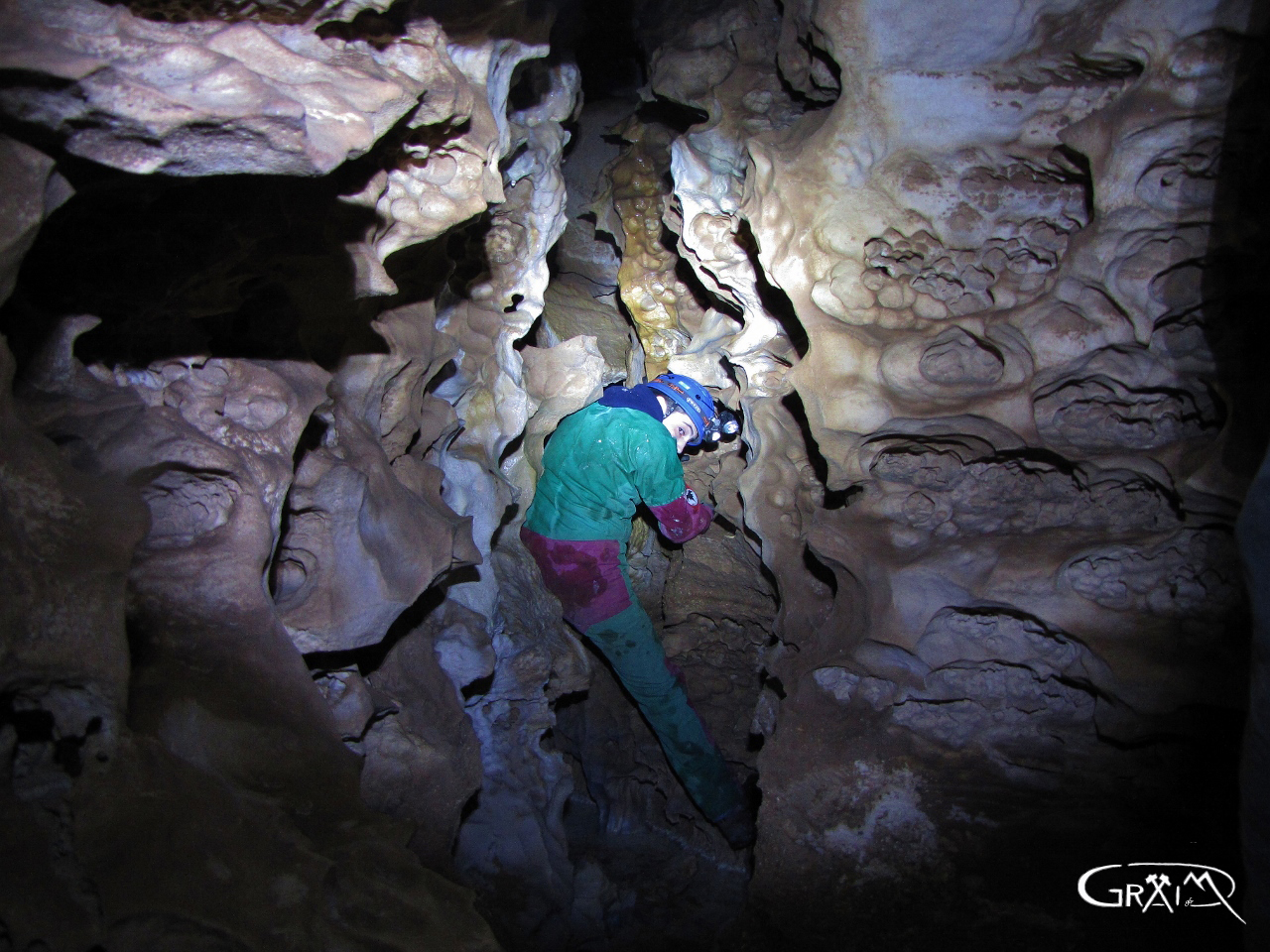 Interno della Grotta (2)